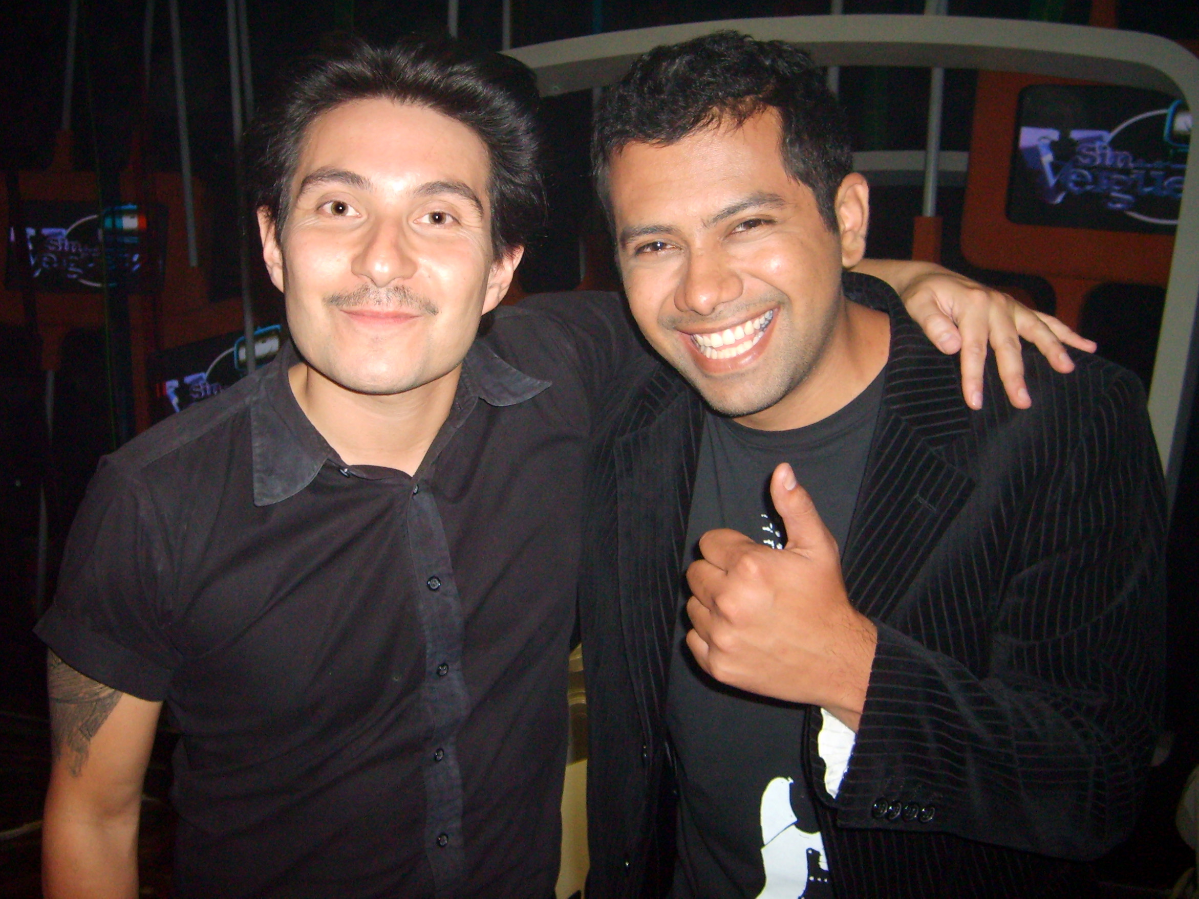 Felipe Avello y Pedro Ruminot luego de grabar el segundo capítulo del programa "Sin Vergüenza", transmitido por Chilevisión. Imagen tomada el 9 de enero de 2008 en el estudio del programa.